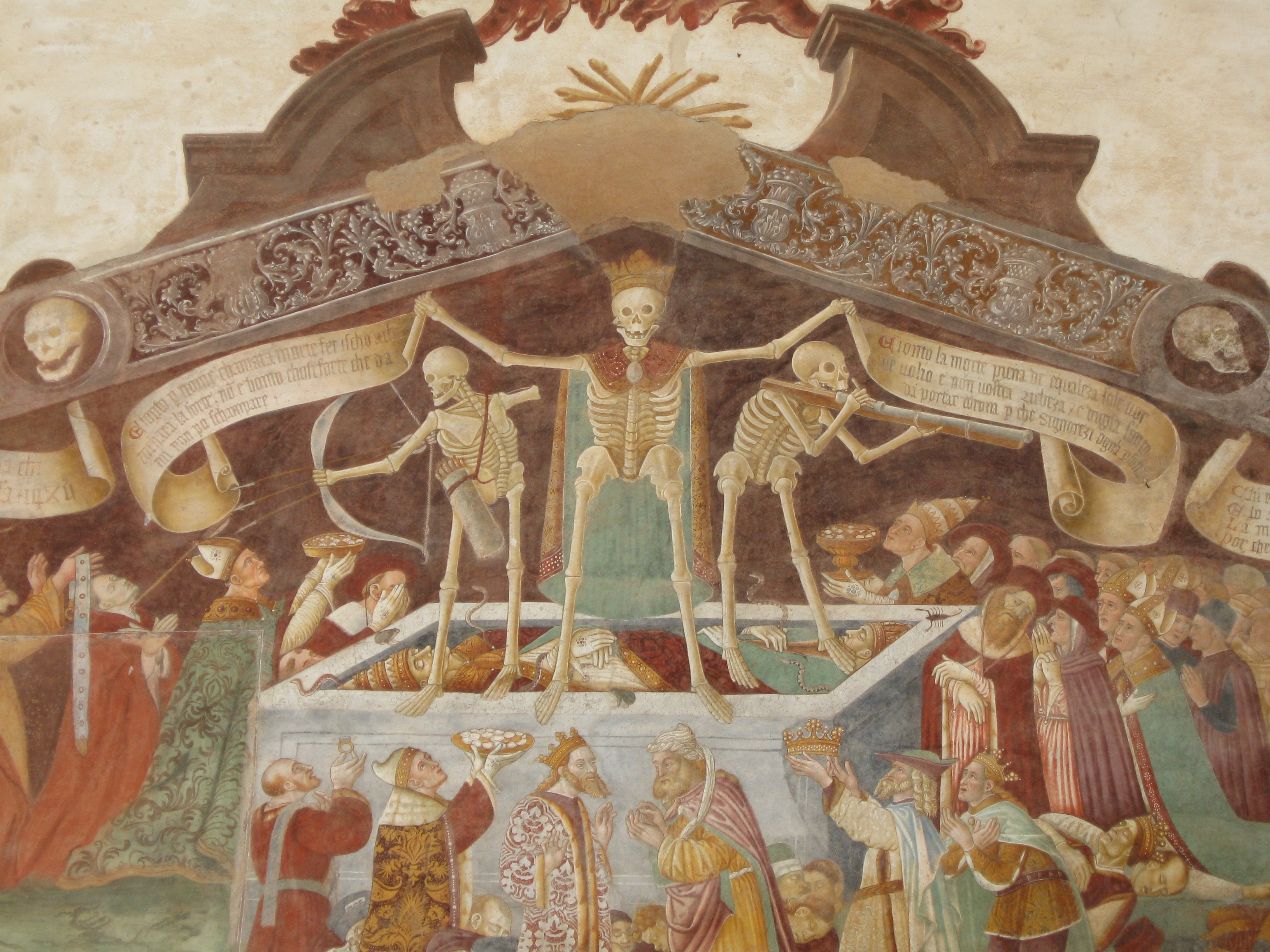 Trionfo della morte a Clusone, Val Seriana, Italy.